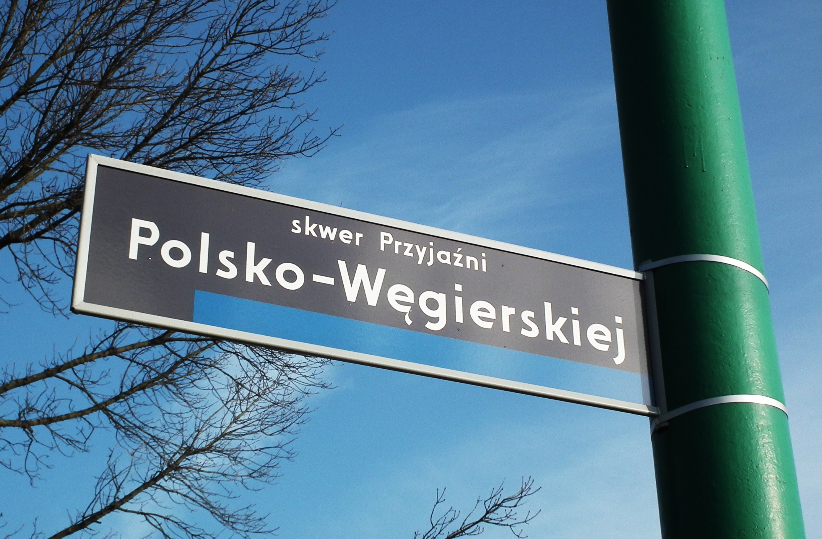 Skwer Przyjaźni Polsko-Węgierskiej w Poznaniu (ul. Kr. Jadwigi/Strzelecka).